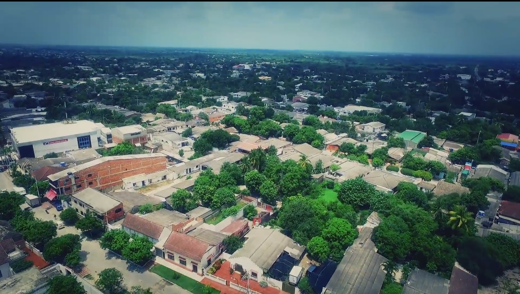 Vista aérea del centro del municipio de Santo Tomas (Atlantico)